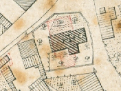 Aus Katasterplan um 1850, Planausschnitt mit der Kirche vor 1861 und rot den Umrissen der neuen eingezeichnet.